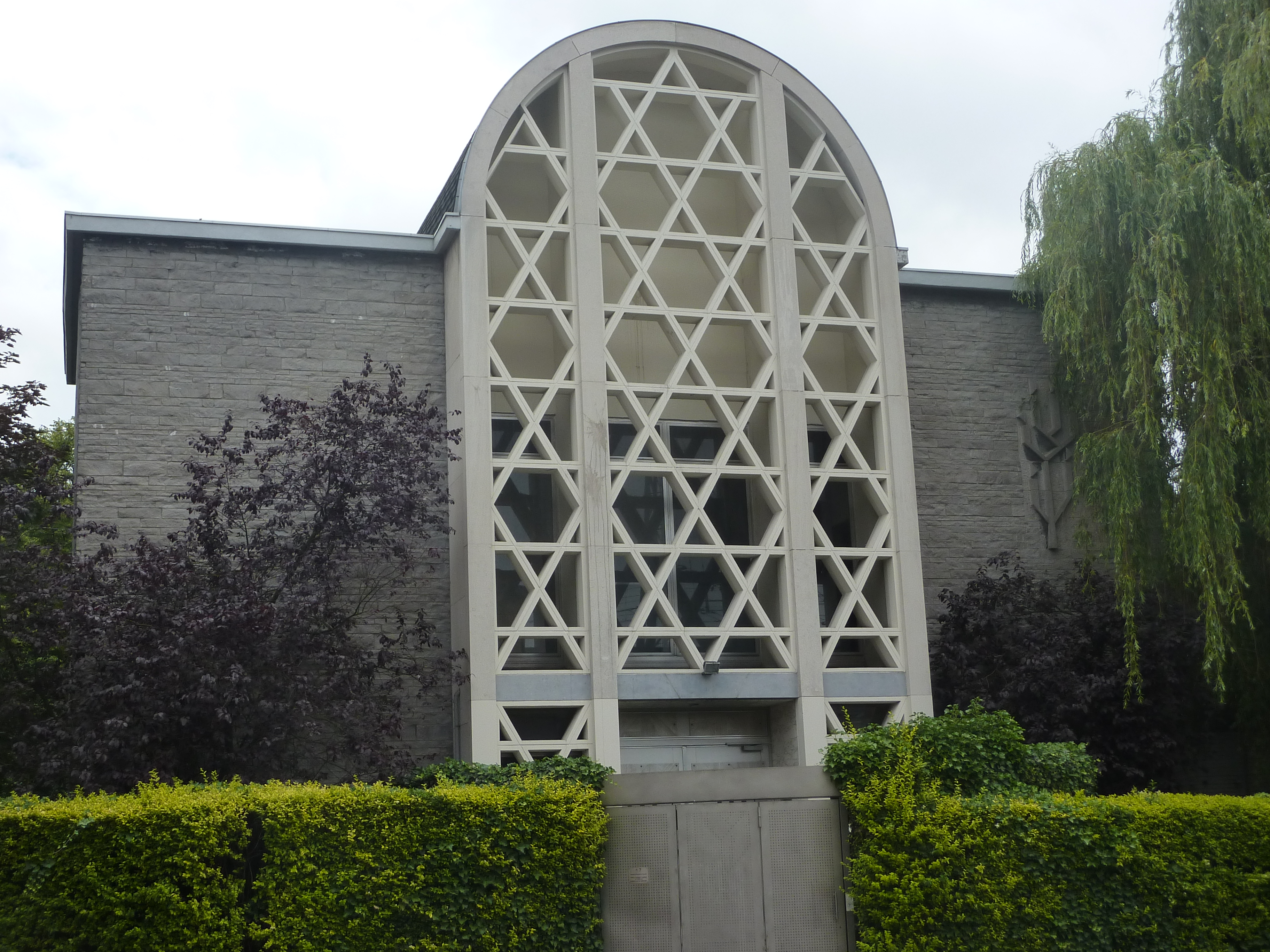 Synagogue Simon et Lina Haïm située rue du Pavillon à Schaerbeek, Bruxelles, Belgique.